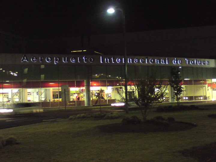 Entrada del Aeropuerto de Toluca